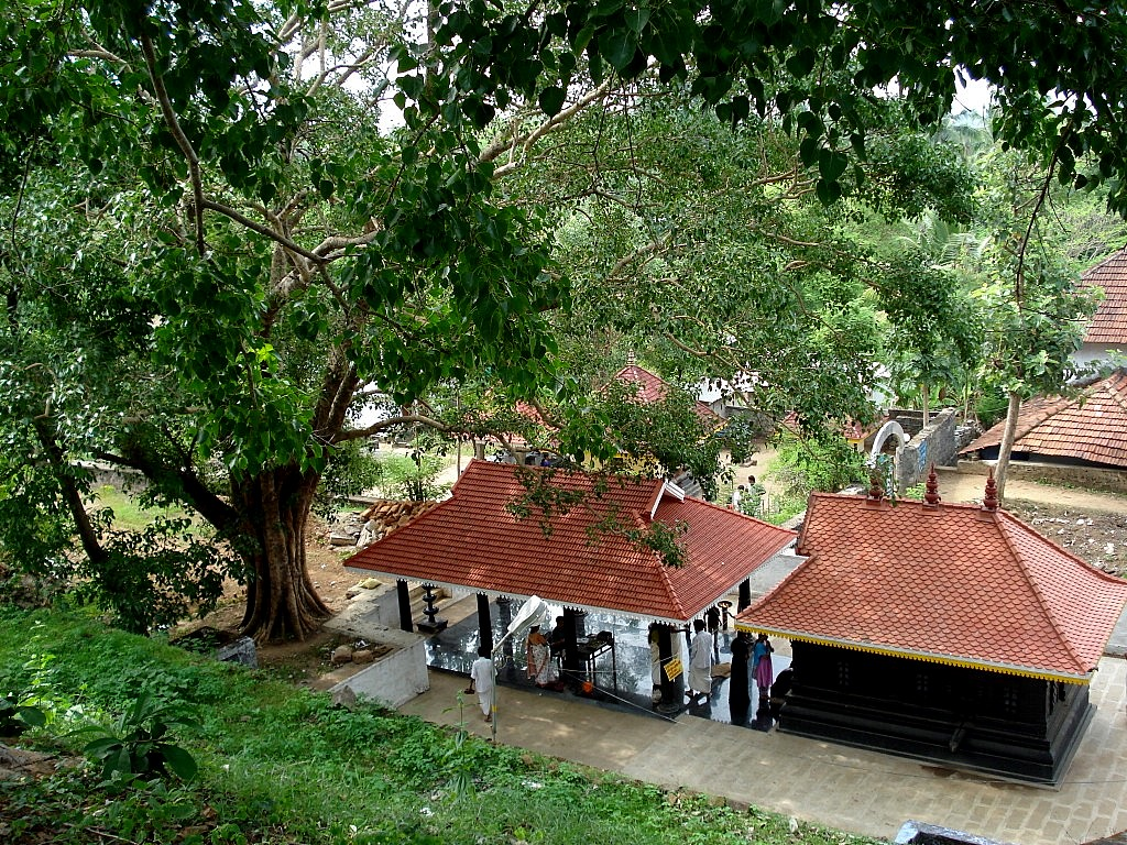 Vilwadrinatha Temple